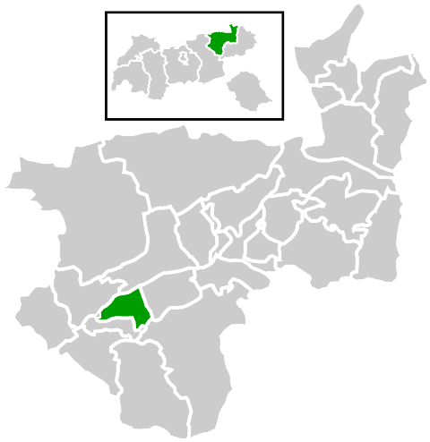 Lage der Gemeinde innerhalb des Bezirks Kufstein